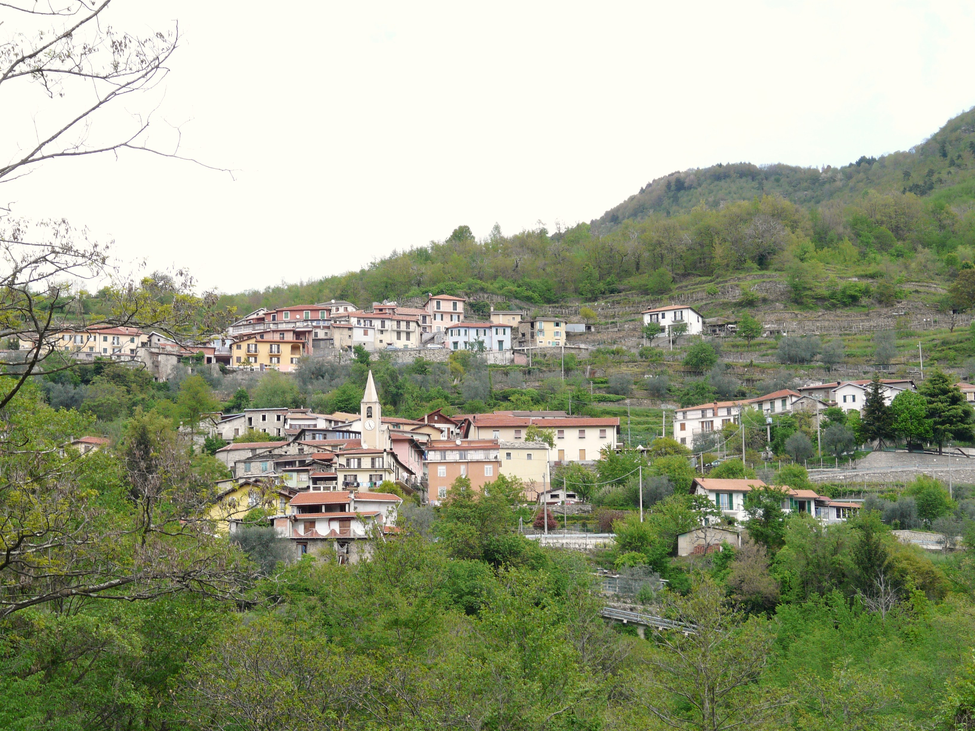 Panorama di Armo, Liguria, Italia